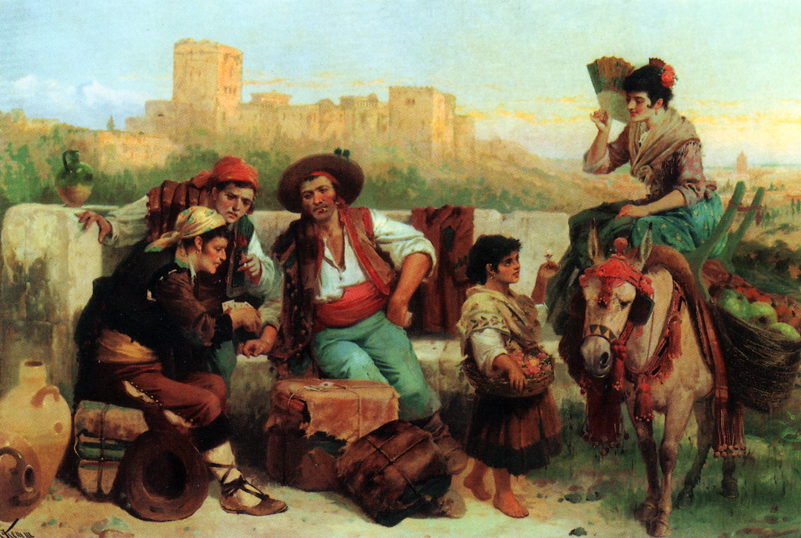 Granadinos